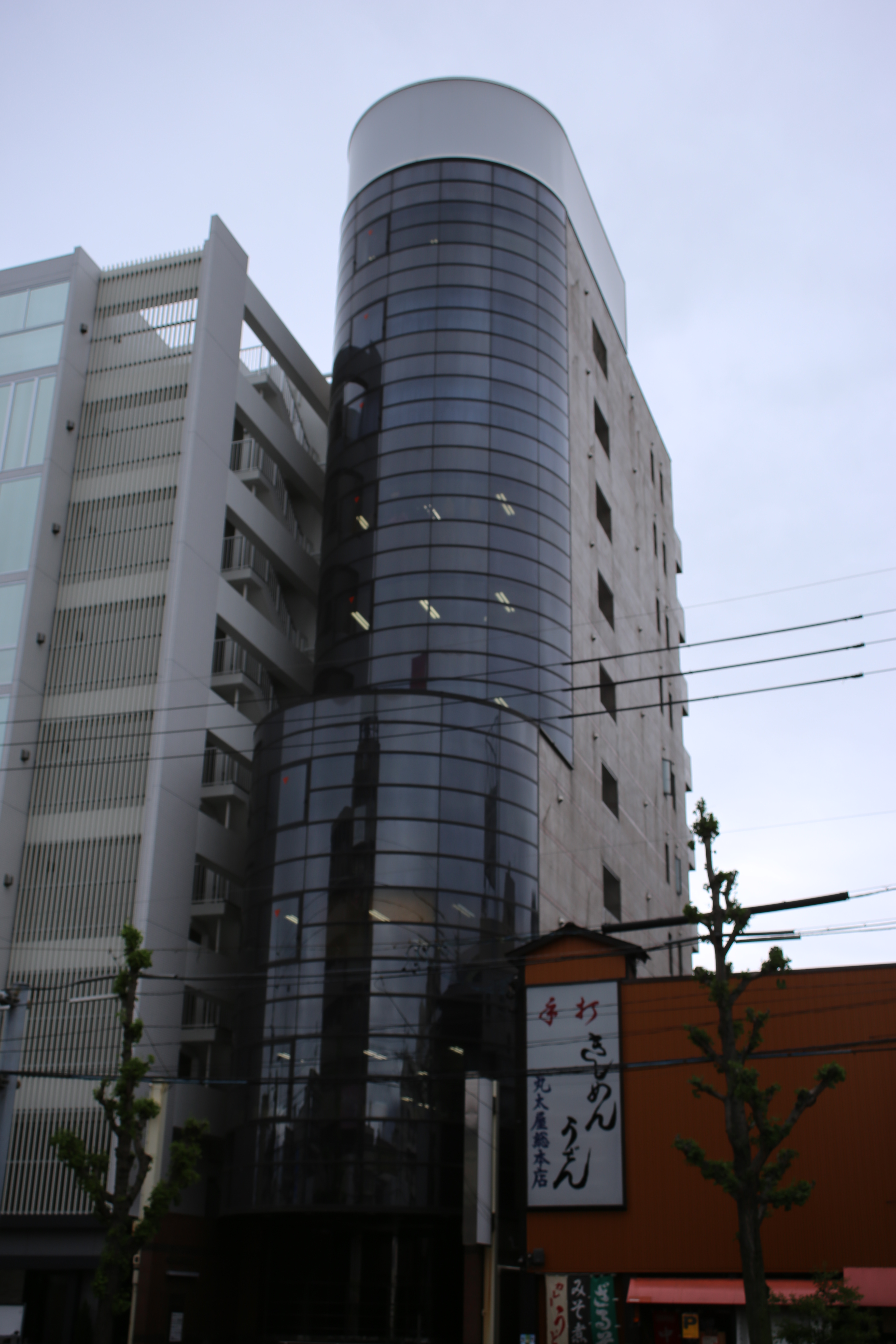 名古屋市北区志賀南通のクラウンビルを北側公道西側より撮影